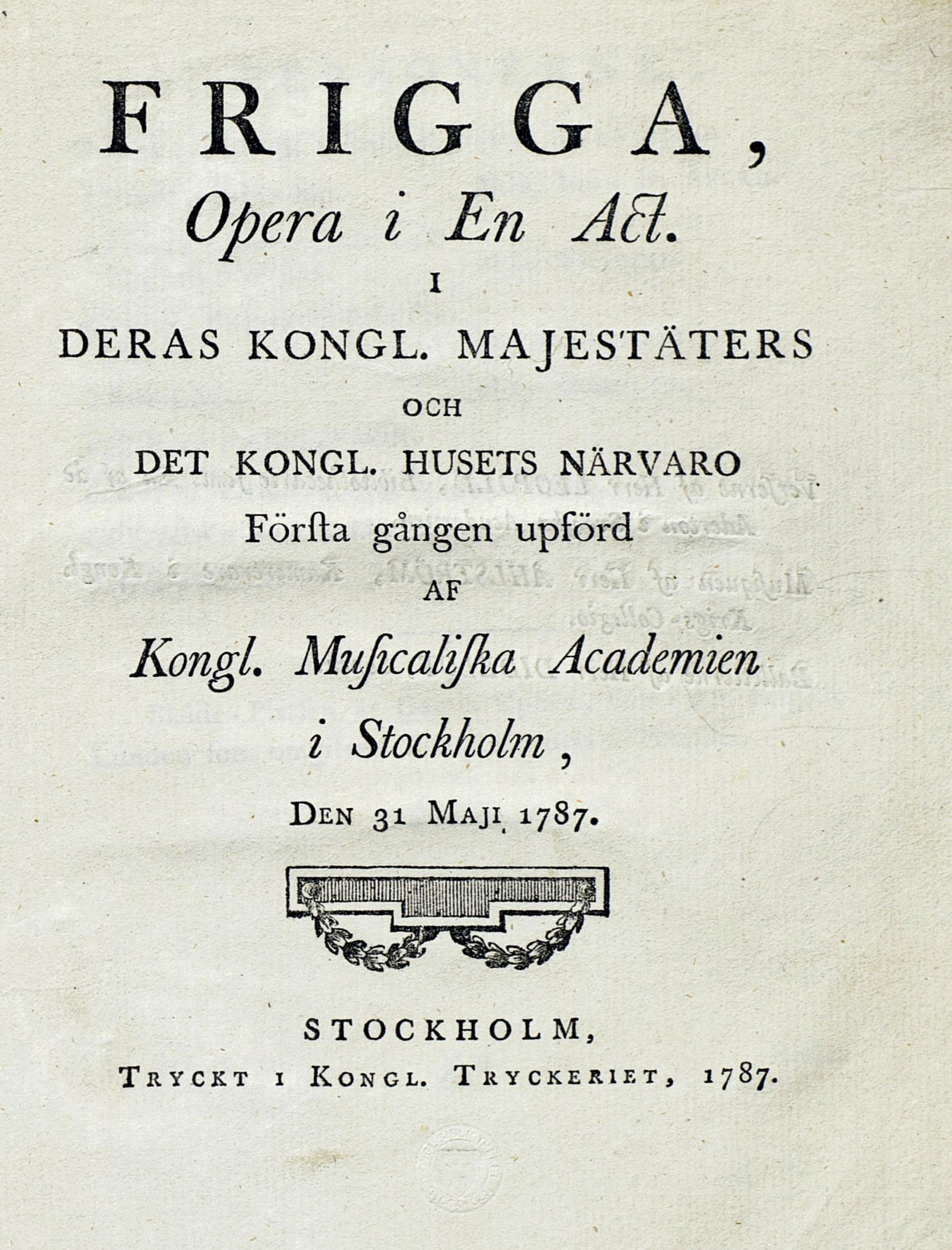 Title page: Frigga, opera i en act. I deras kongl. majestäters och det kongl. husets närvaro första gången upförd af kongl. musicaliska academien i Stockholm, den 31 maji 1787